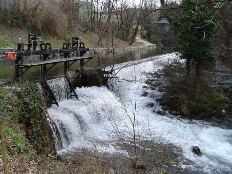 Le Thiou à Cran-Gévrier. Mars 2004. Didier Halatre.